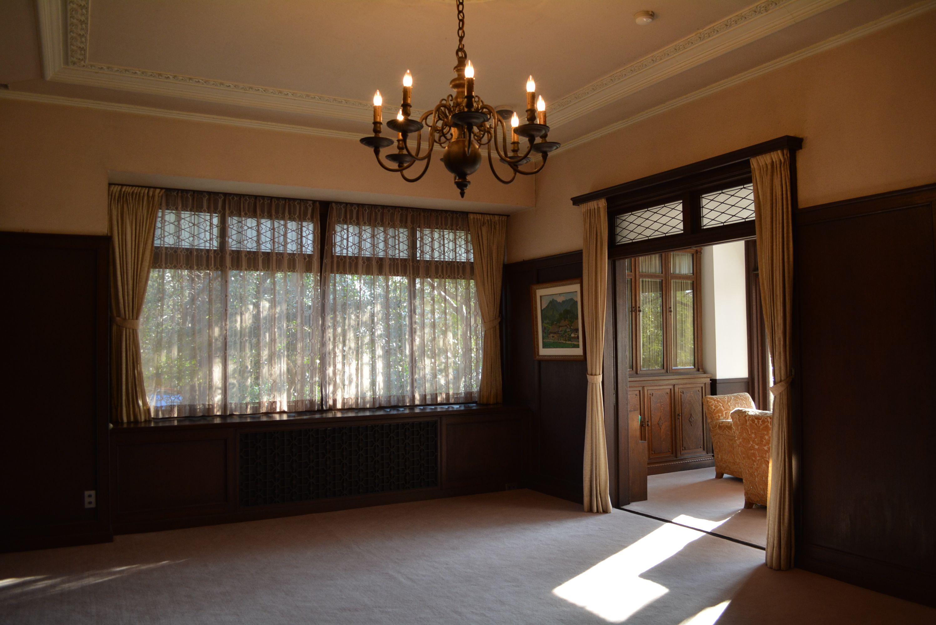 旧小坂邸寝室